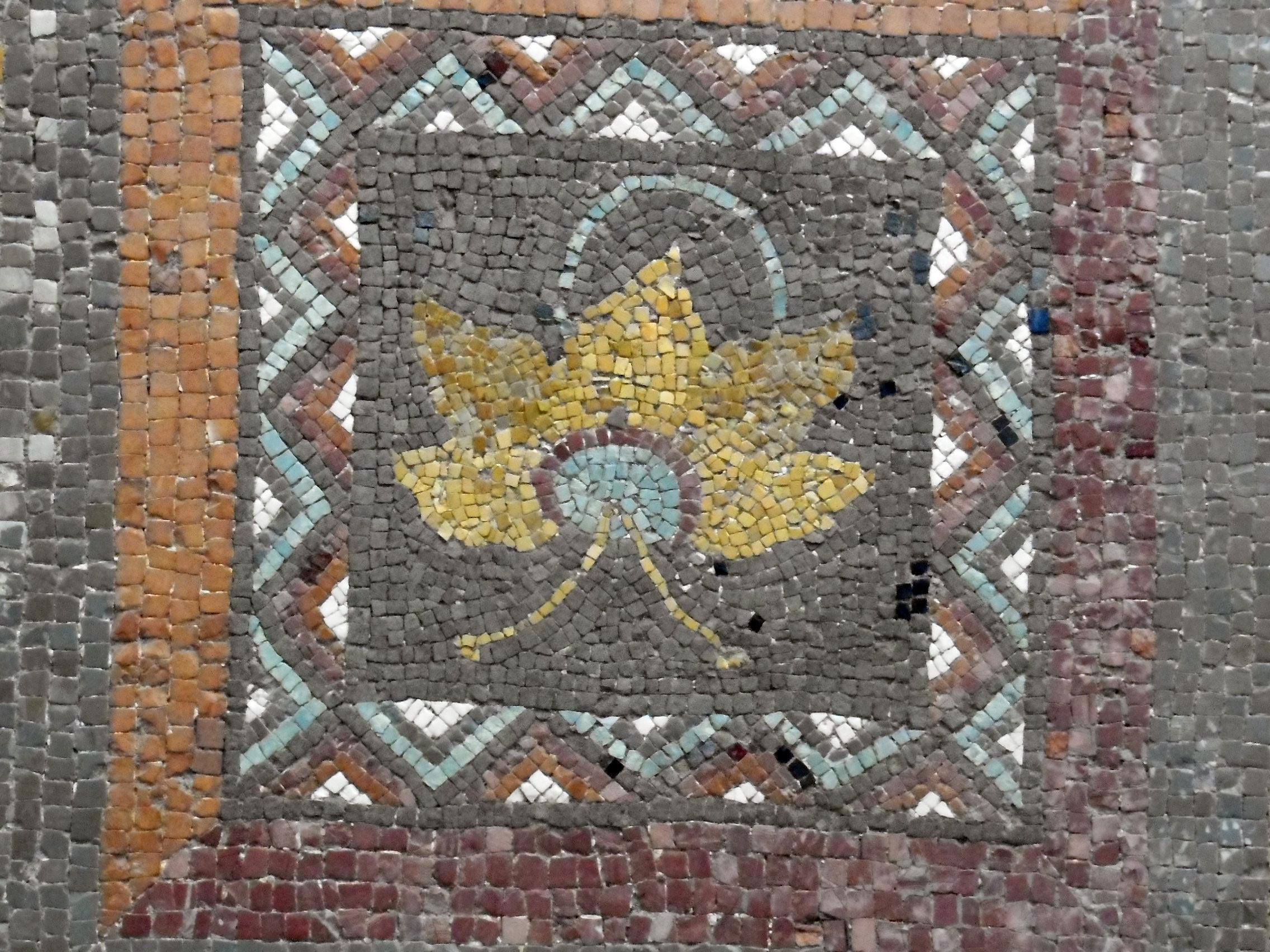 Roma, Museo nazionale romano, Palazzo Massimo, mosaico romano dalla soglia del triclinio di una villa romana presso Casale San Basilio (via Nomentana). I secolo a.C. Particolare di un cassettone.